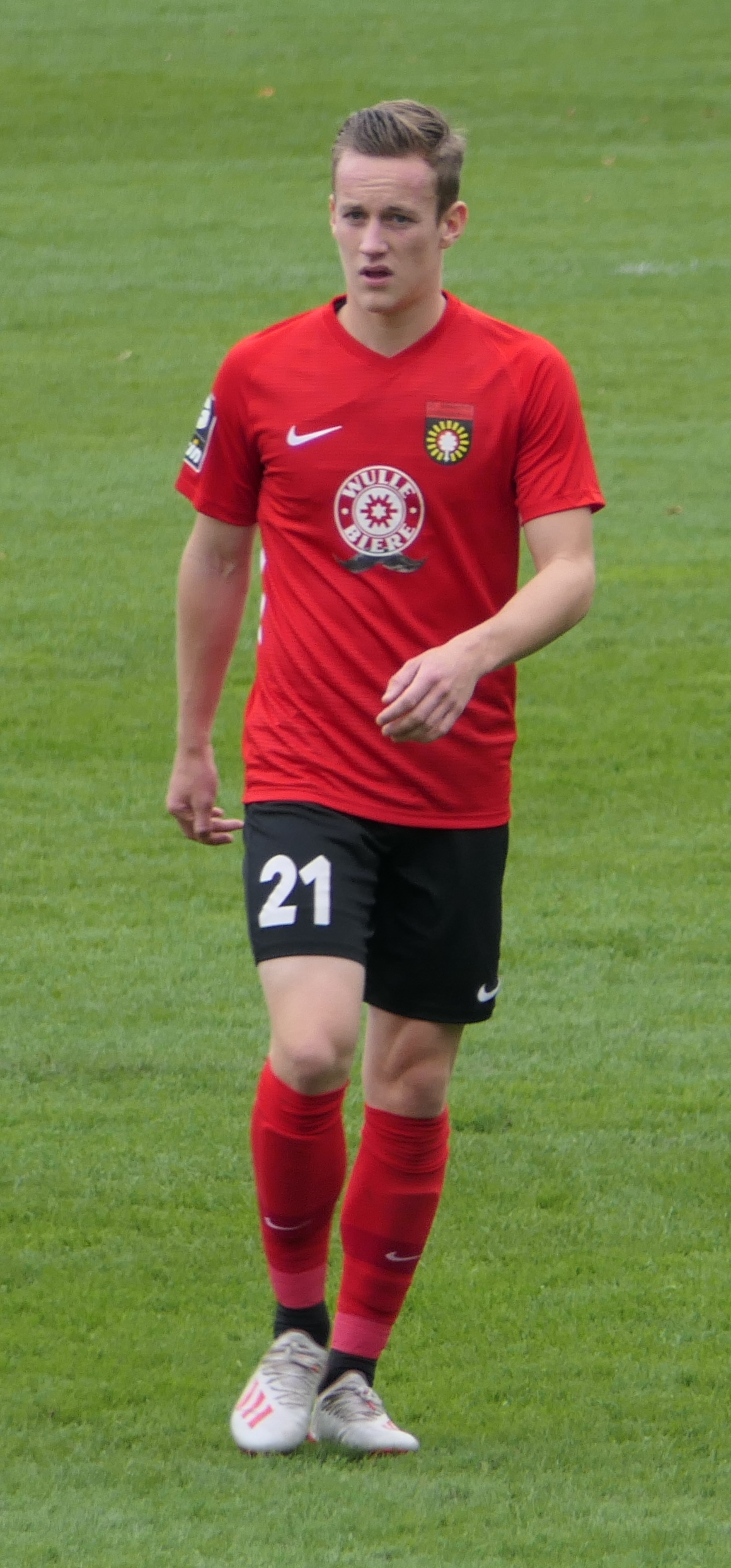 Der Fussballprofi Jonas Behounek im Trikot der SG Sonnenhof Großaspach beim Heimspiel gegen Eintracht Braunschweig am 27.10.2019.